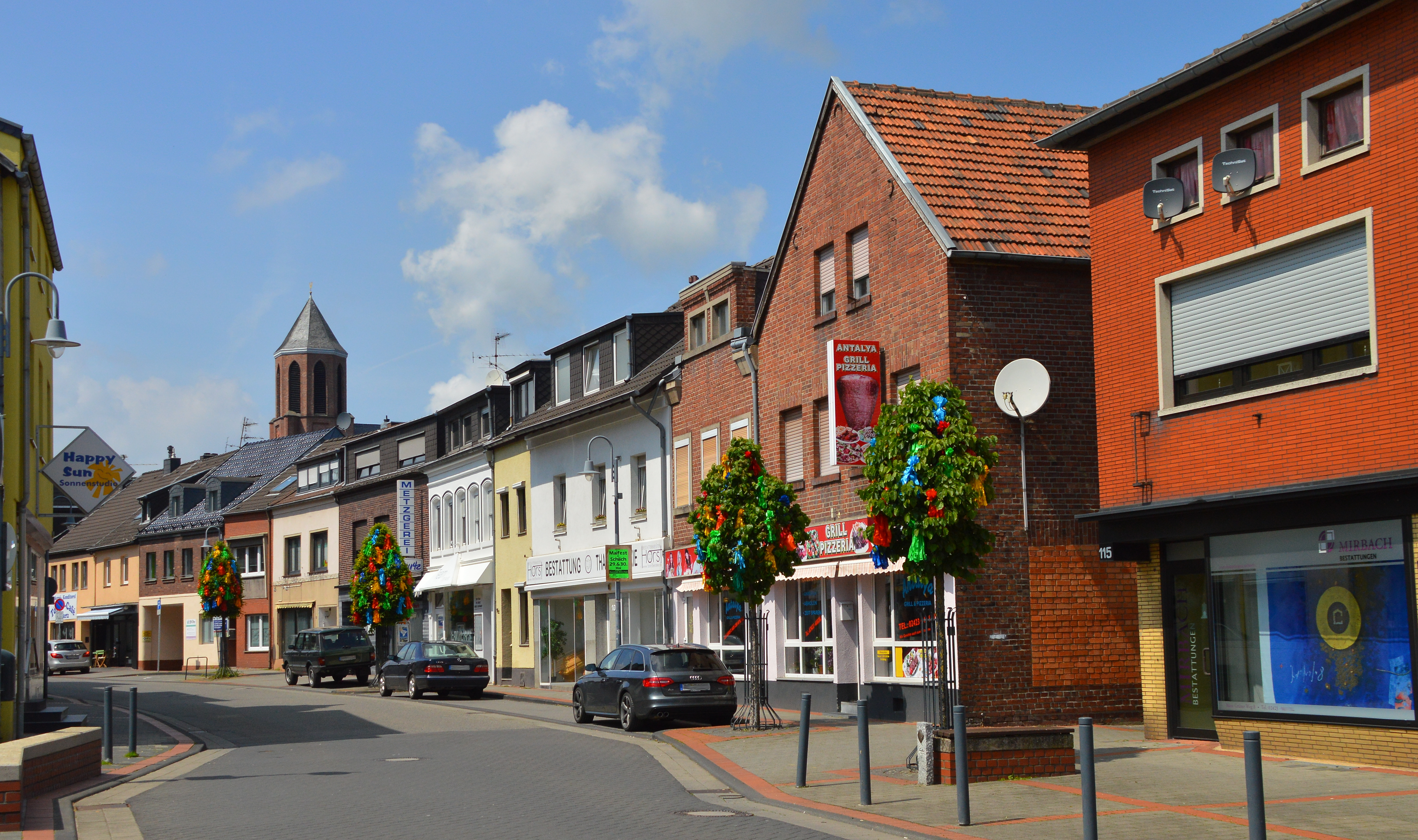 Hauptstraße Langerwehe mit Maischmuck, im Hintergrund der Turm von St. Martin.